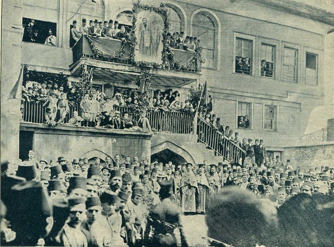 Тържество по случай 11 май в Солунската българска мъжка гимназия. Преди 1913 г. Публикувано в "Илюстрация Илинден", година 2, София, май 1929, книга 6(16), с. 1.